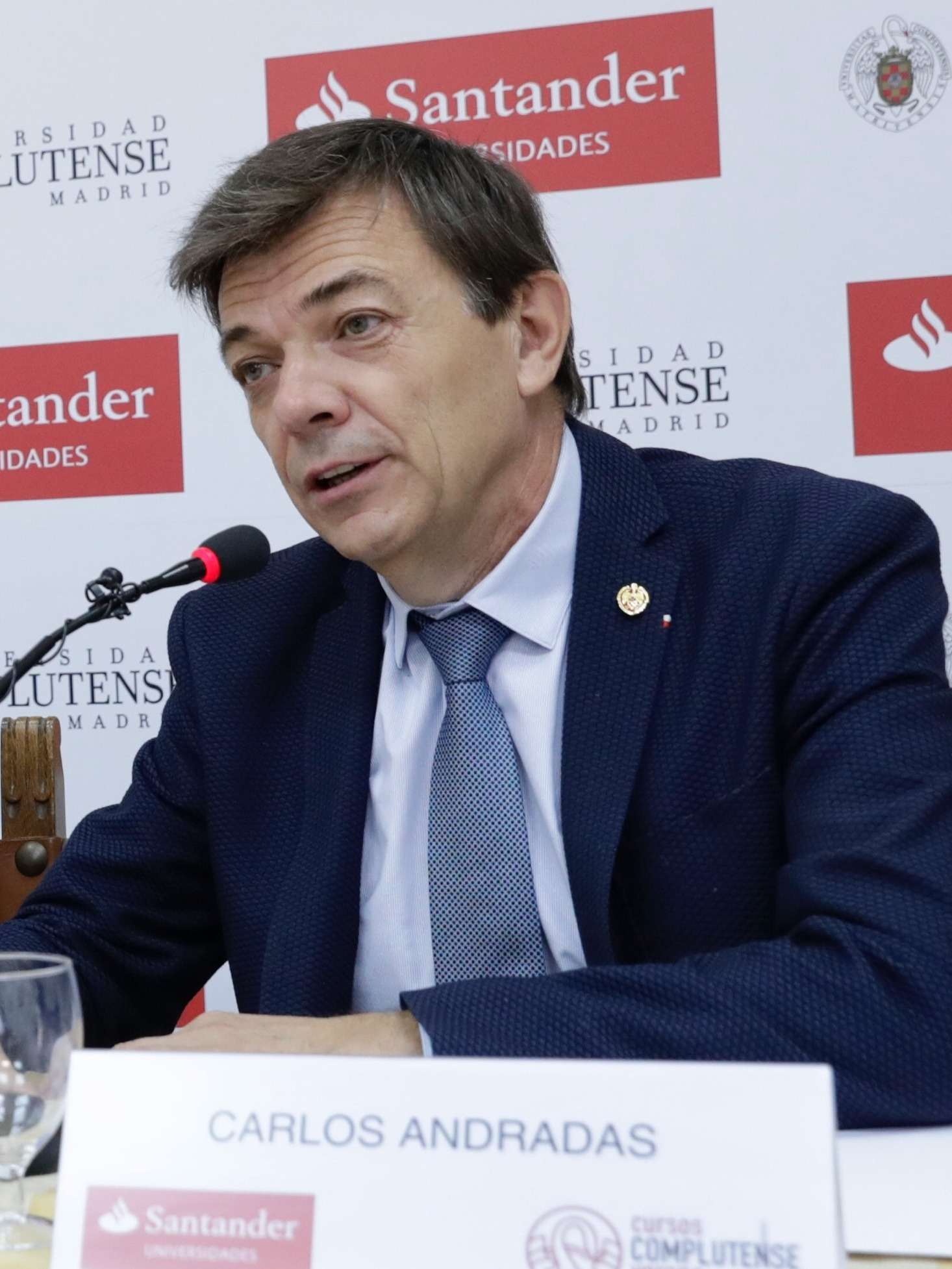 Inauguración del curso de verano de la Universidad Complutense de Madrid sobre la calidad democrática en España